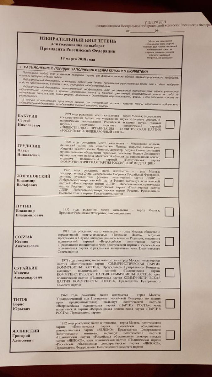 Шаблон избирательного бюллетеня для голосования на выборах президента России 2018 года